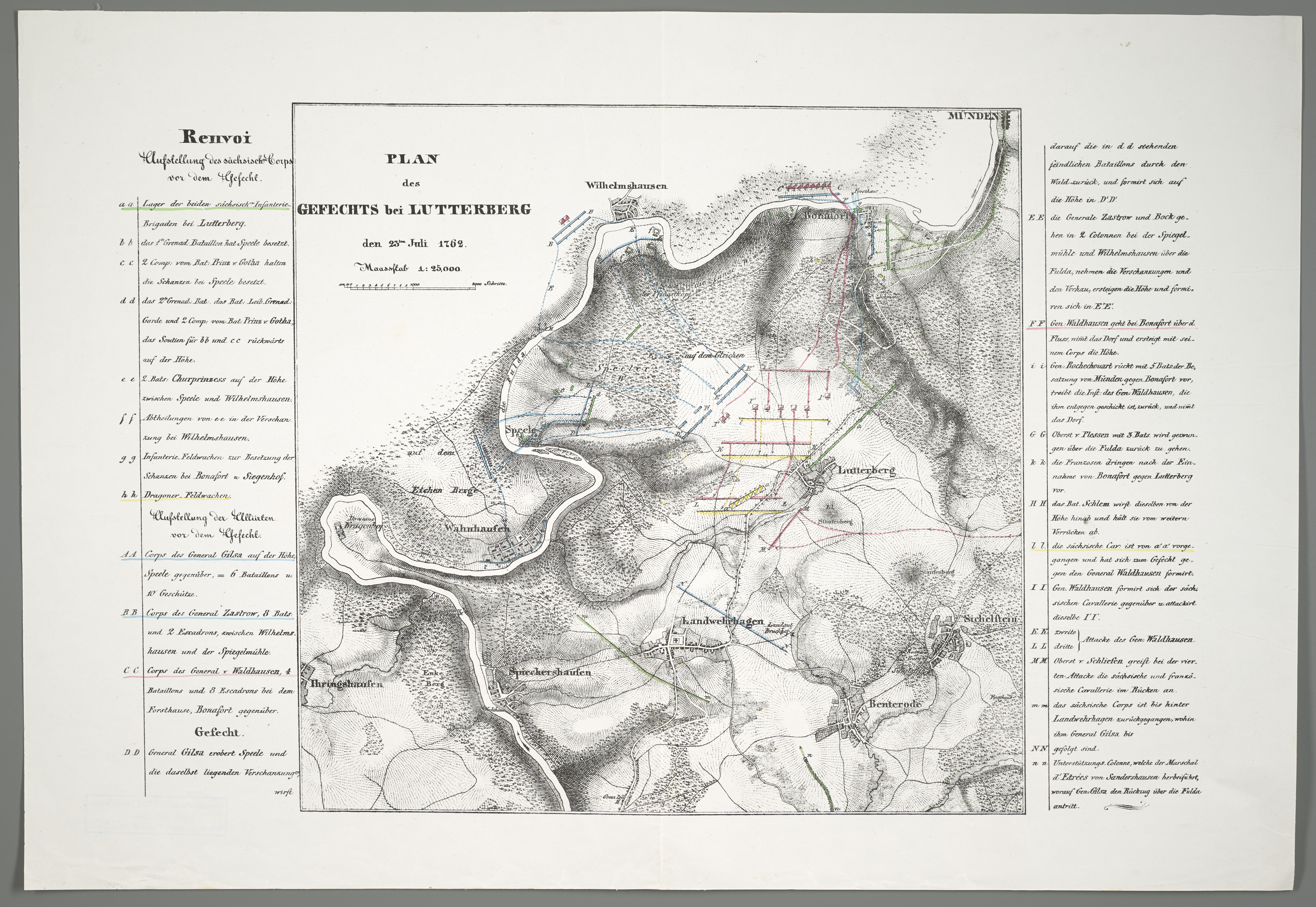 1 Kt. : teilw. kolor. (36 x 35 cm) ; Maßstab 1:25.000 ; Koordinaten E 9°31'23"-E 9°39'04"/N 51°25'13"-N 51°20'17" ; Vermutlich aus: Geschichte des siebenjährigen Krieges, in einer Reihe von Vorlesungen, mit Benutzung authentischer Quellen / bearb. von den Offizieren des grossen Generalstabs. - Maßstab in graph. Form (Schritte). - Titel und Maßstab oben links. - Ohne Kt.-Netz. - Mit Truppenstellungen und Truppenbewegungen. - Mit Erl. links und rechts neben dem Kt.-Feld. - Relief: Schraffen